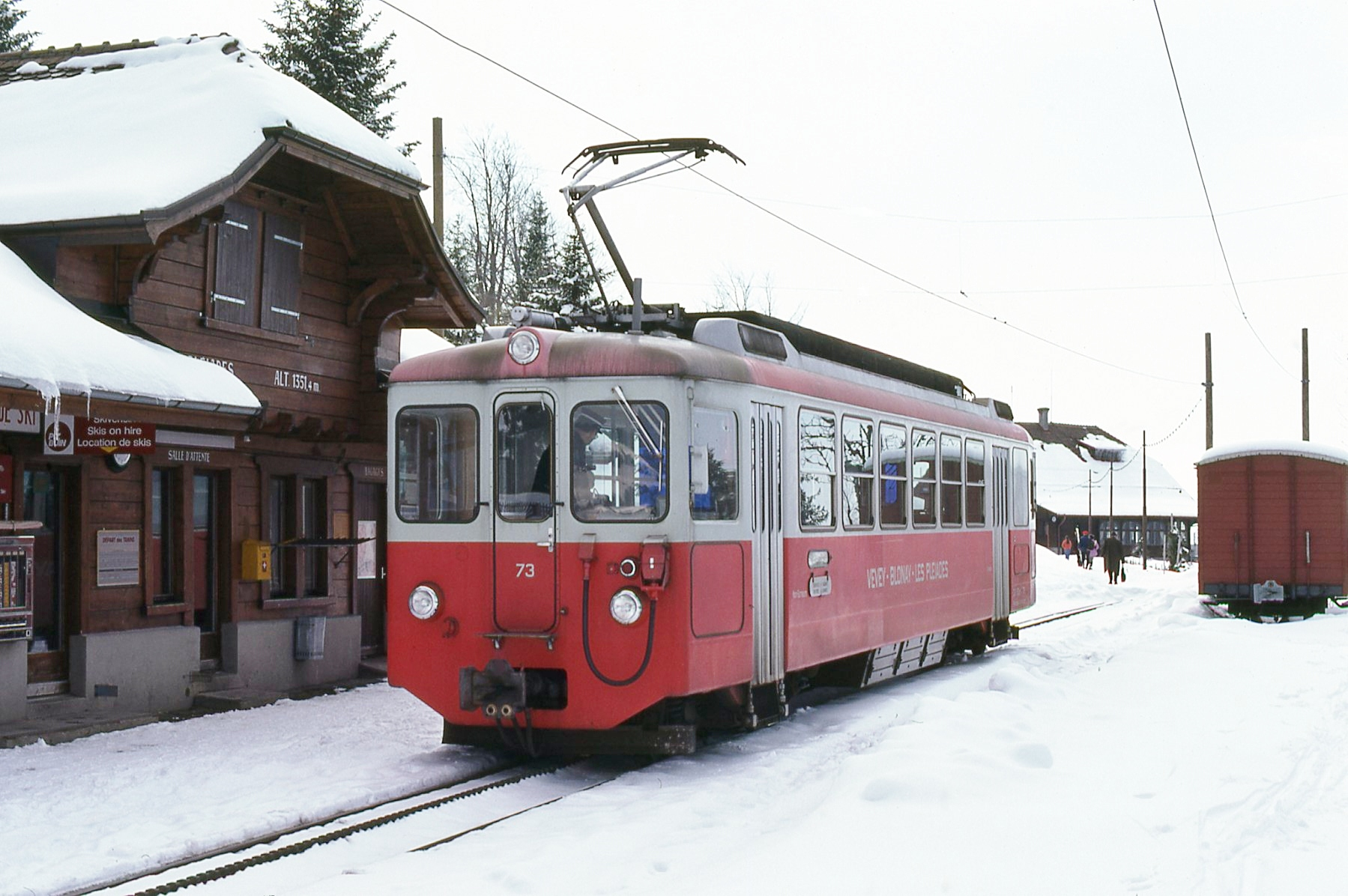 Photo. Trams aux Fils. Prise en avril 1979 Gare des Pléiades à 1351,4m. La ligne Vevey- Blonay-Chamby a été inaugurée le 1er octobre1902 à voie métrique, sa longueur était de 8.670 Kilomètres, la section de voies de 3 Kilomètres de Blonay à Chamby a été fermée en 1966 (Actuellement ligne touristique) Le 2 avril 1904 la section sur Châtel-Saint-Denis est inaugurée, (section supprimée le 1er juin 1969). Le 8 juillet 1911 la section à crémaillère des Pléiades est inaugurée. A ce jour, il ne reste que la section de voies de 10 Kilomètres à adérance et crémaillière de Vevey aux Pléiades